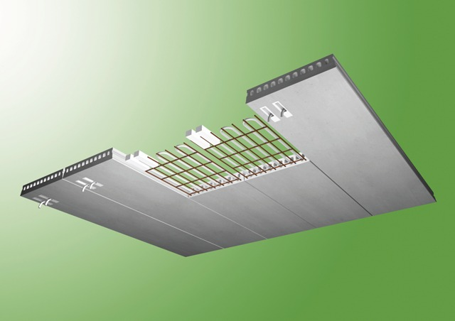 Bei der Herstellung werden die Deckenelemente mit Hilfe von Spannstahllitzen vorgespannt. Auf diese Weise werden hohen Spannweiten ermöglicht.